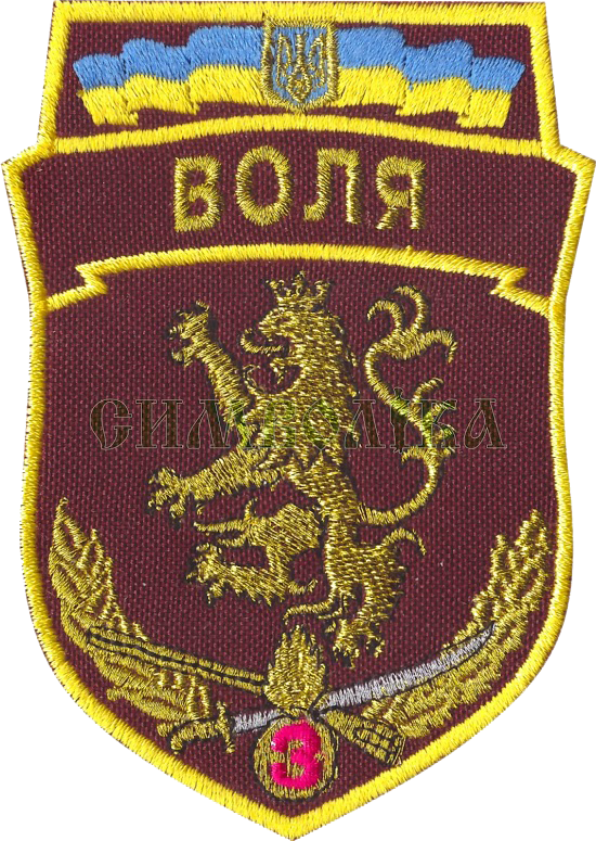 Нарукавний знак, 3 окремий моторизований піхотний батальйон